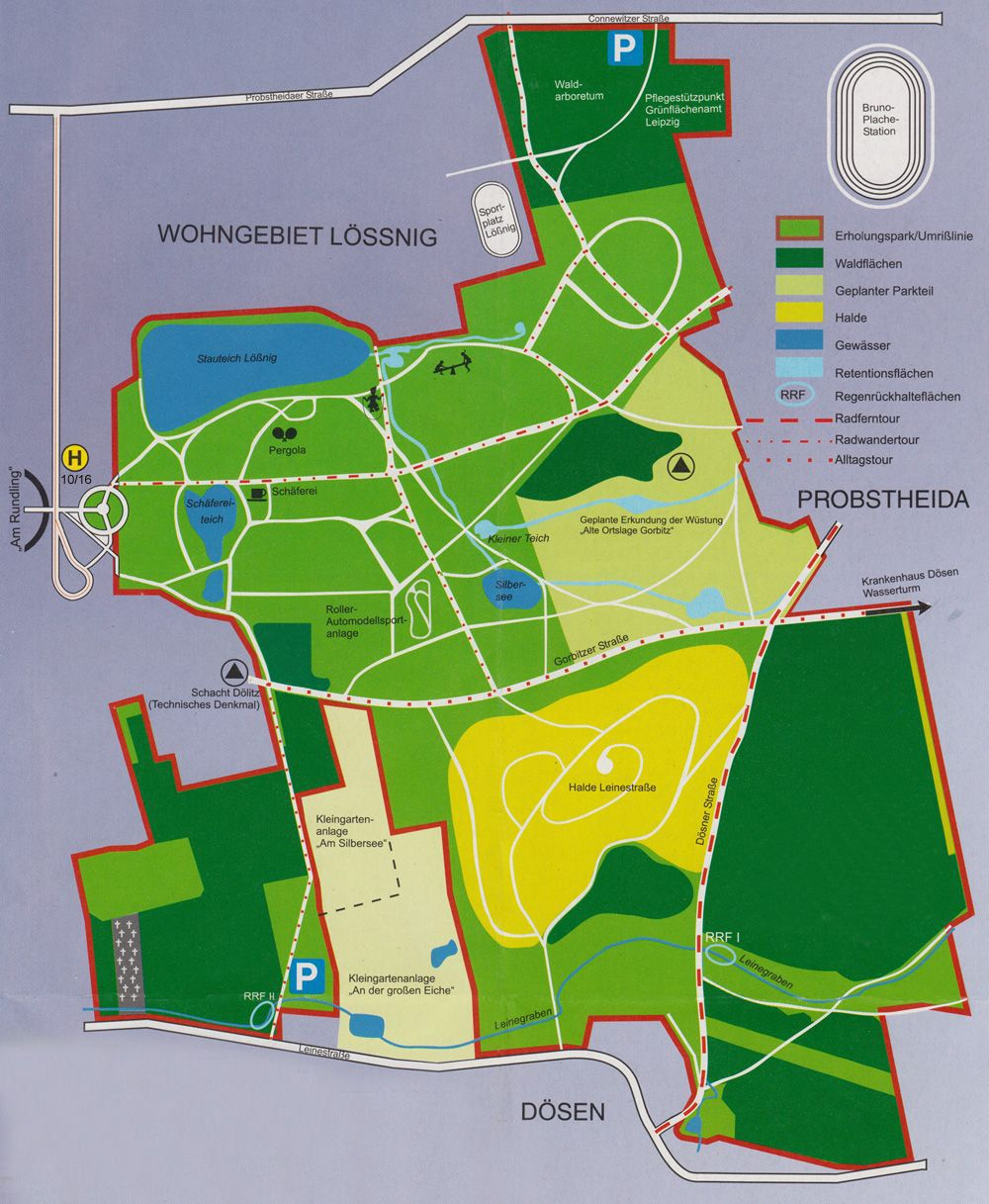 Landschaftsschutzgebiet Lößnig-Dölitz in Leipzig. Der obere Teil ist der Erholungspark Lößnig-Dölitz